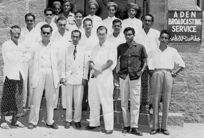 Group photo of some college alumni working in Aden Radio,1950s